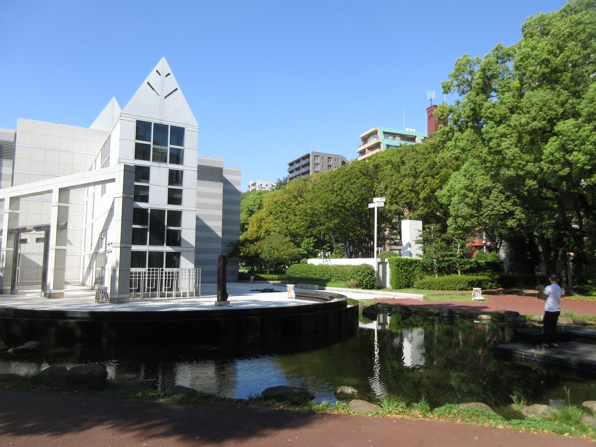 白川公園の中にある名古屋市美術館